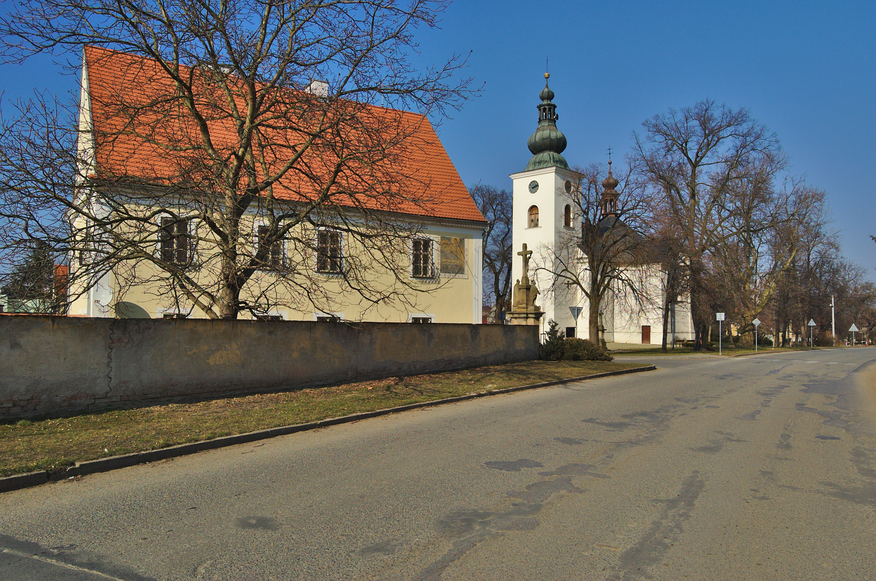 Fara a kostel svatého Jana Křtitele, Olšany, okres Prostějov